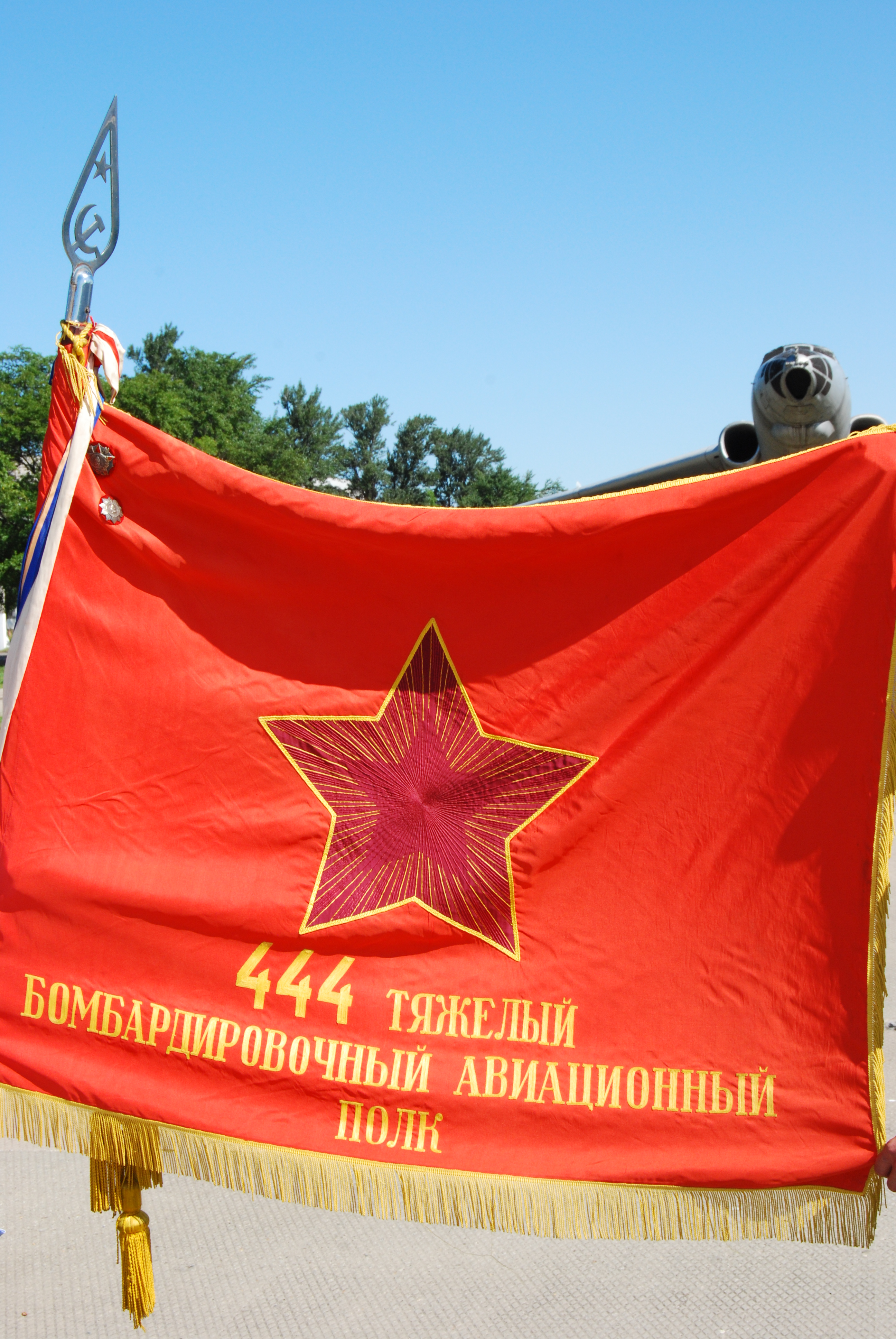 Знамя 444 тяжёлого бомбардировочного авиационного полка (Воздвиженка)